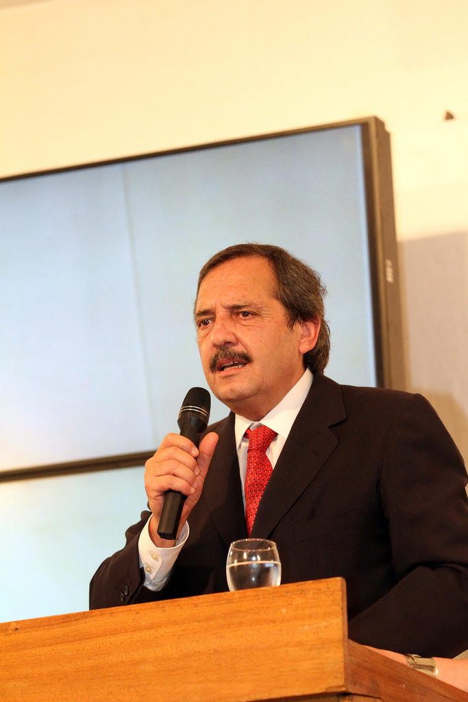 Argentine Congressman Ricardo Alfonsín.